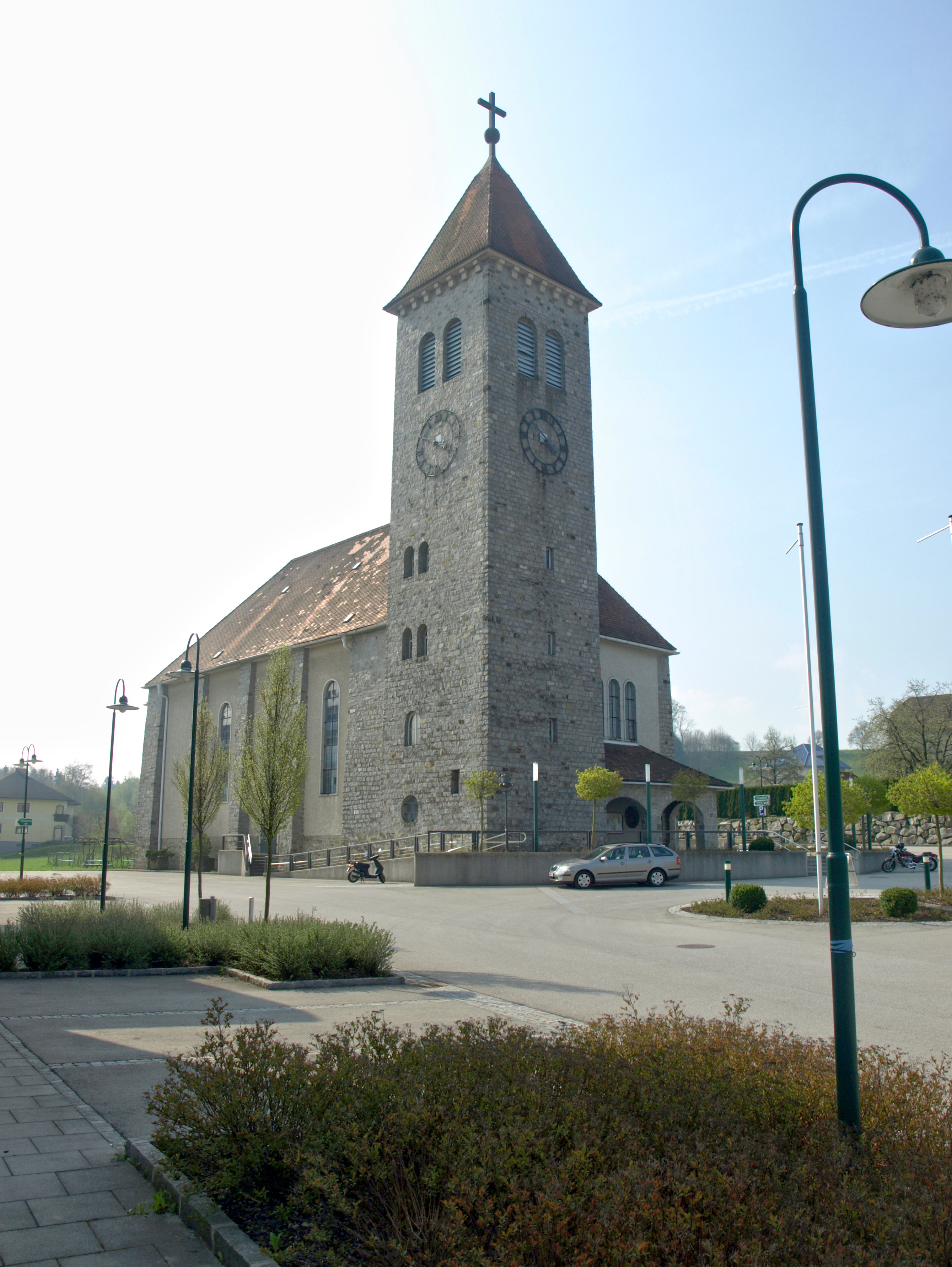 Kath. Pfarrkirche Vestenthal